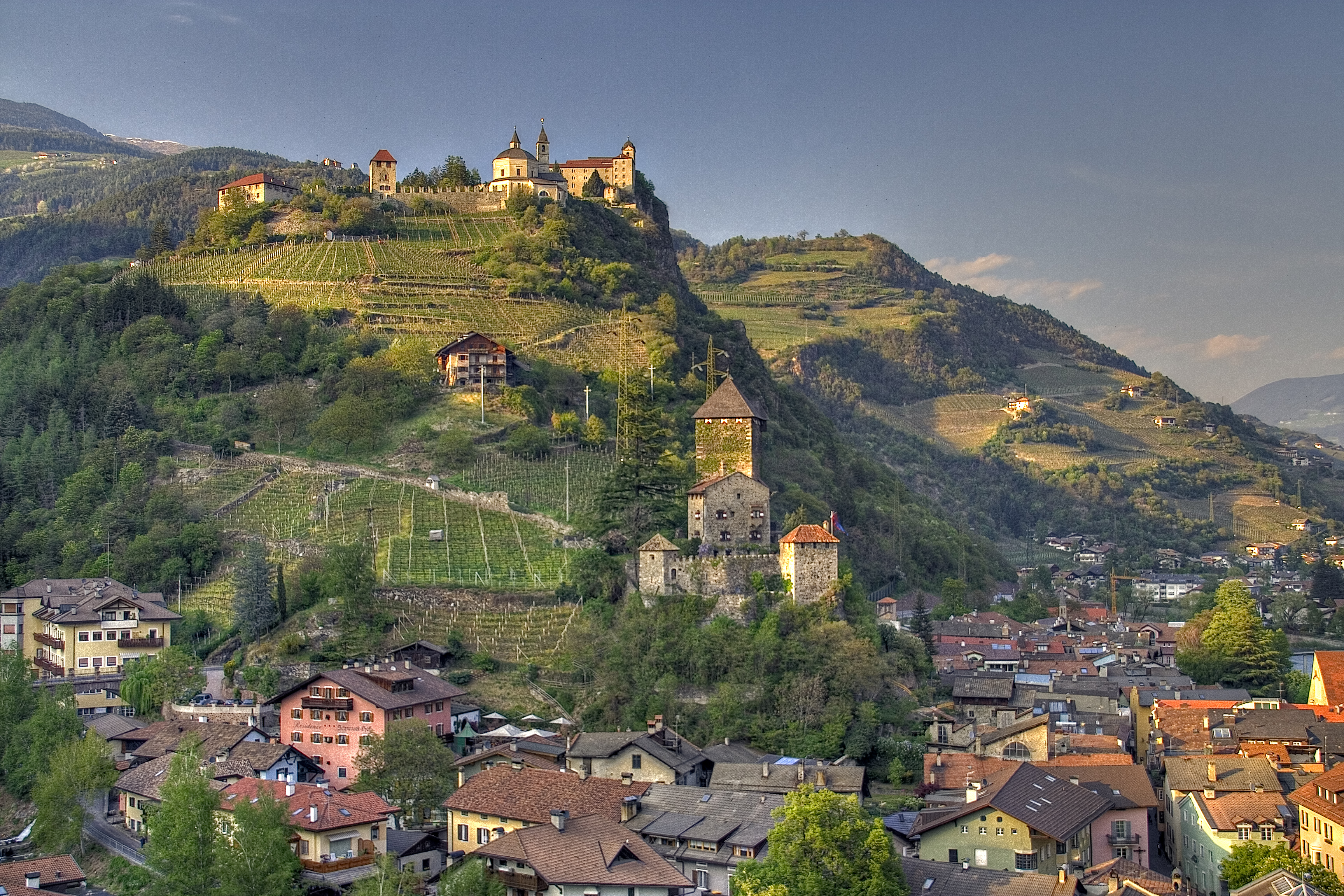 Chiusa - Klausen und Burg Branzoll